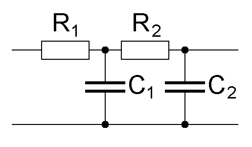 Dua-orda RC-filtrilo